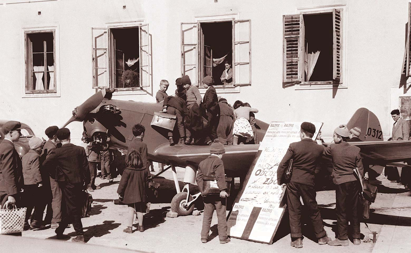 Na Titovem trgu v Ptuju je ptujski aeroklub razstavil svoje staro motorno letalo O 312